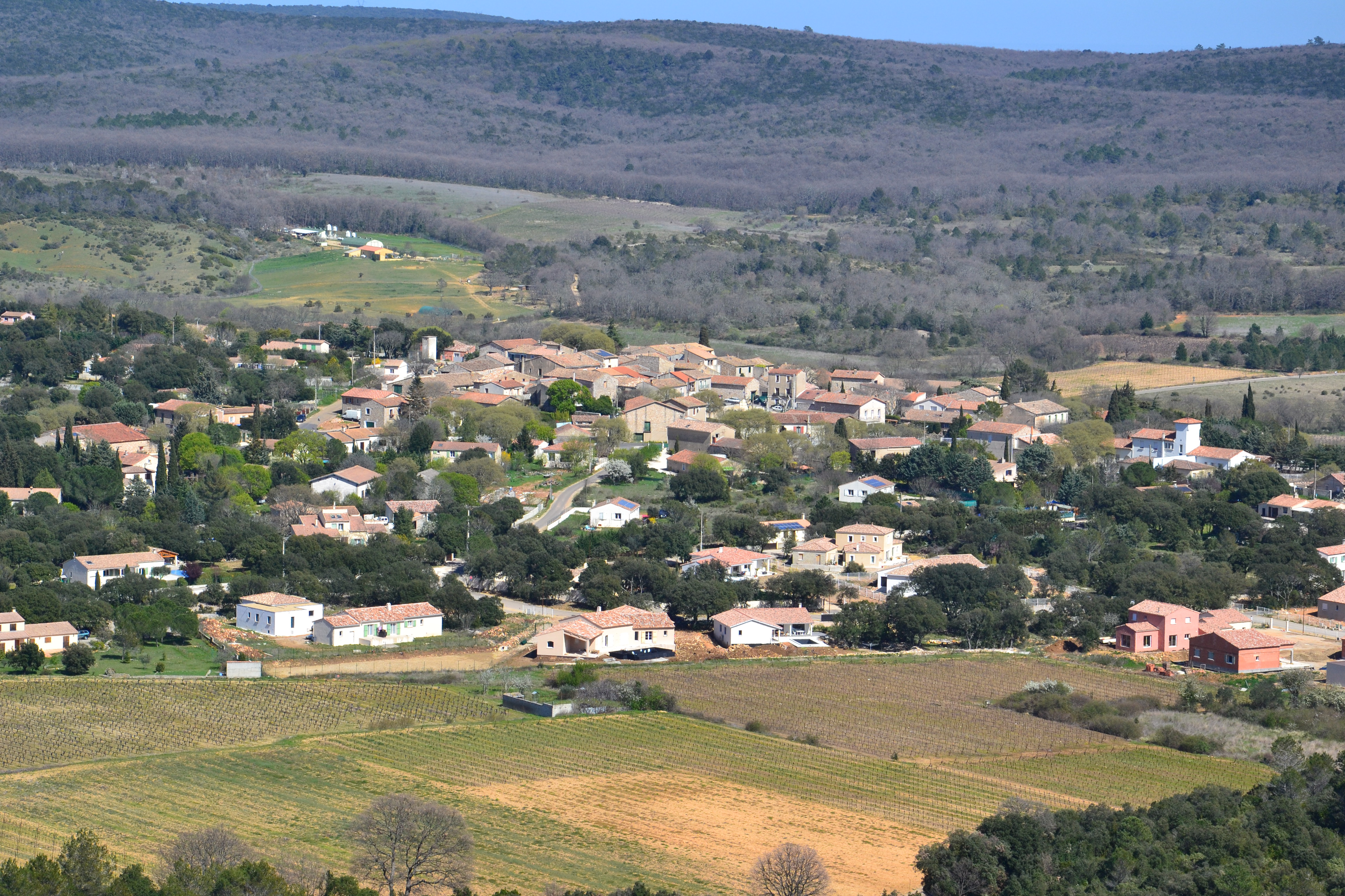 Vue sur La Boissière (Hérault) depuis le Puech Bartelié.